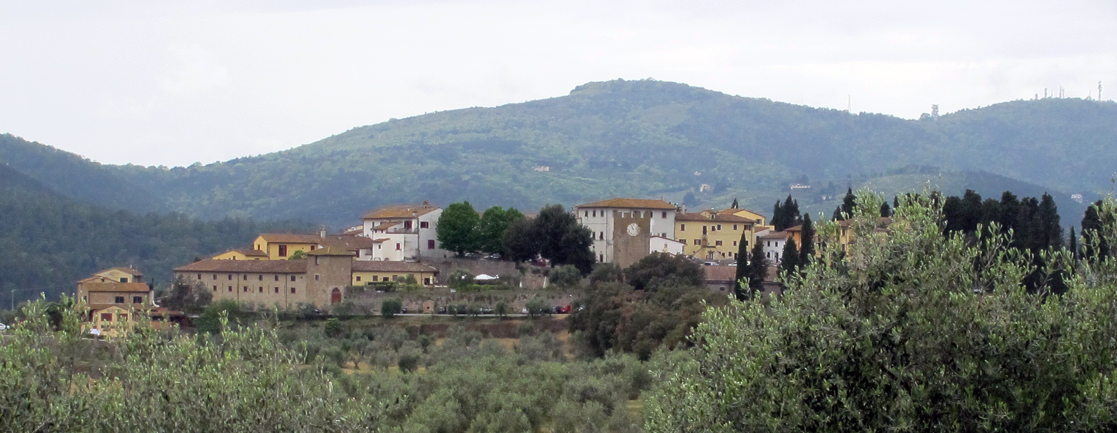 Artimino, Carmignano, Prato, Toscana, Italia